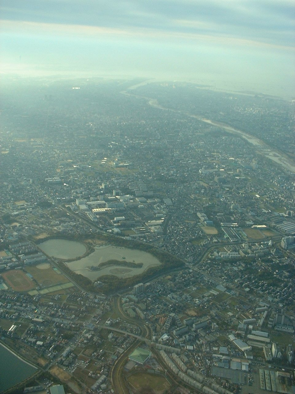 昆陽池 右上の河川はja:武庫川 全日空101便から